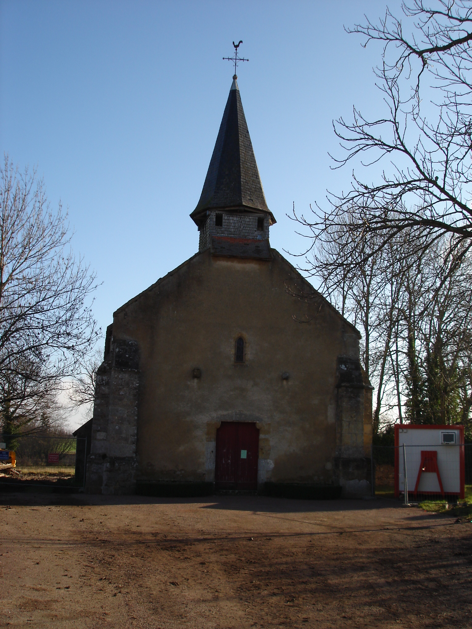 Feusines (36) : L'église Saint-Pierre.